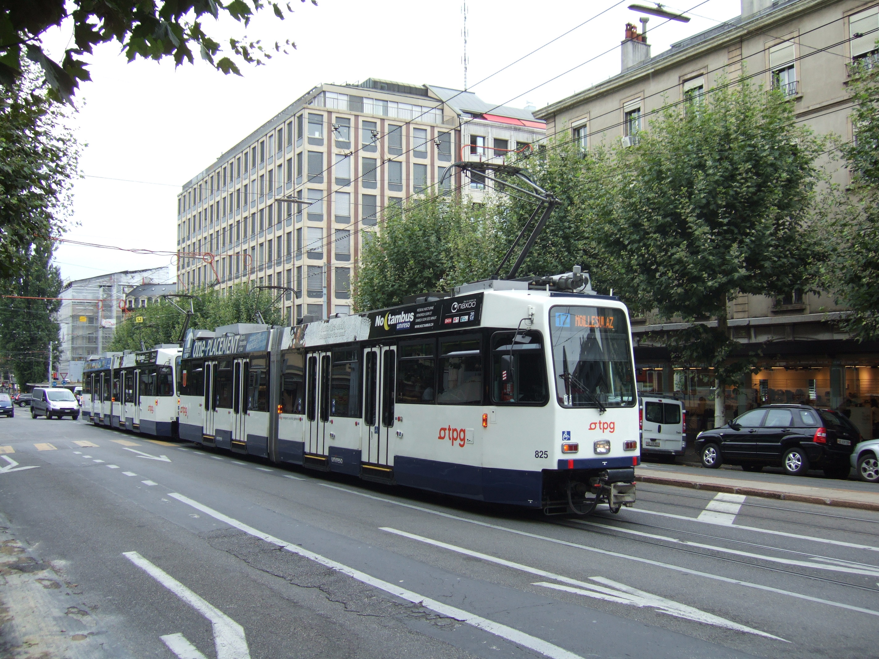 Photo. Trams aux Fils. Ligne 17 Double traction de DAV